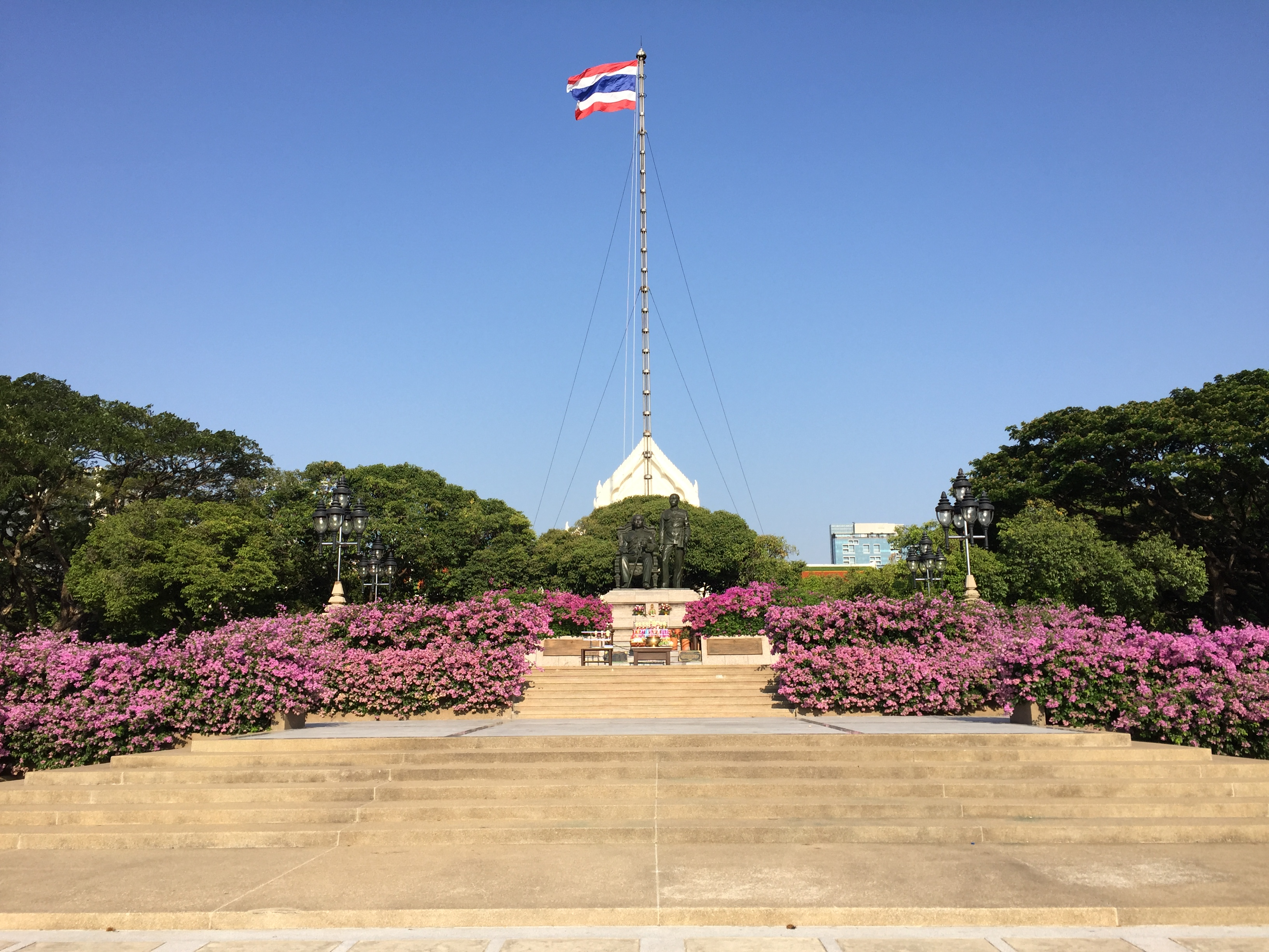 พระบรมราชานุสาวรีย์สมเด็จพระปิยมหาราชและสมเด็จพระมหาธีรราชเจ้า หรือพระบรมราชานุสาวรีย์สองรัชกาล ด้านหน้าหอประชุมจุฬาลงกรณ์มหาวิทยาลัย